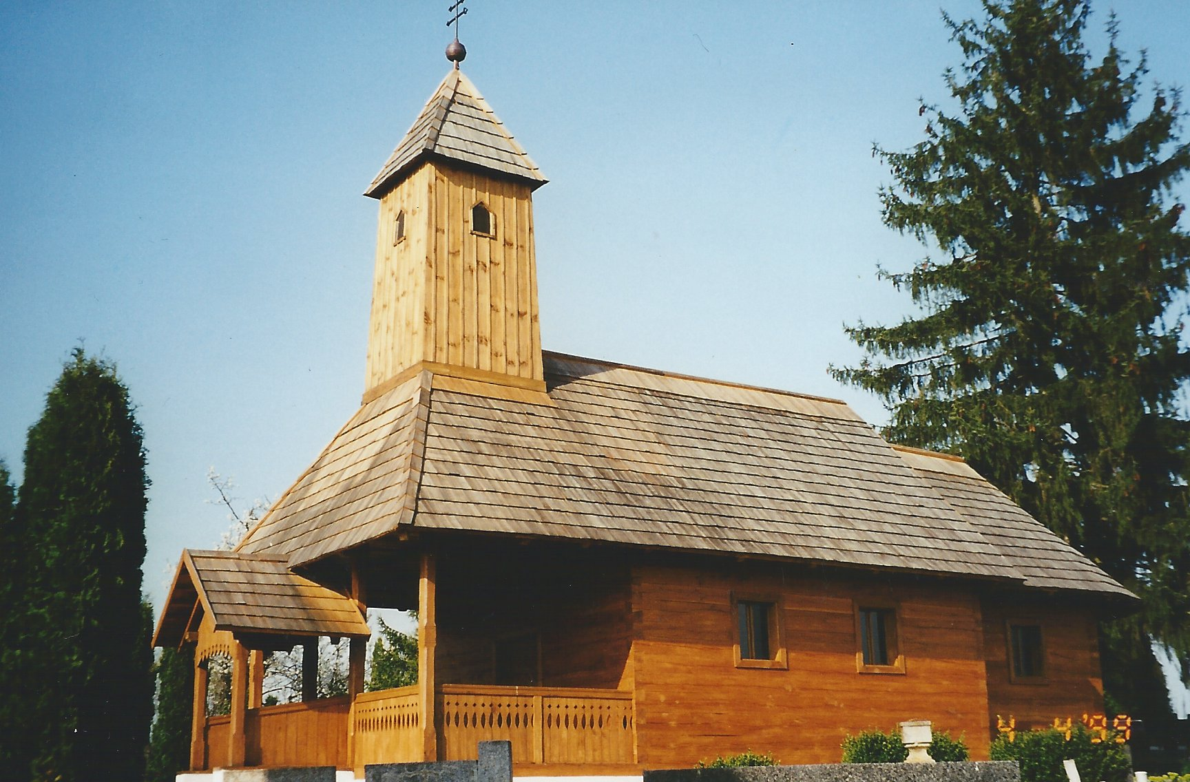 Drvena kapela sv. Andrije u Brezinama